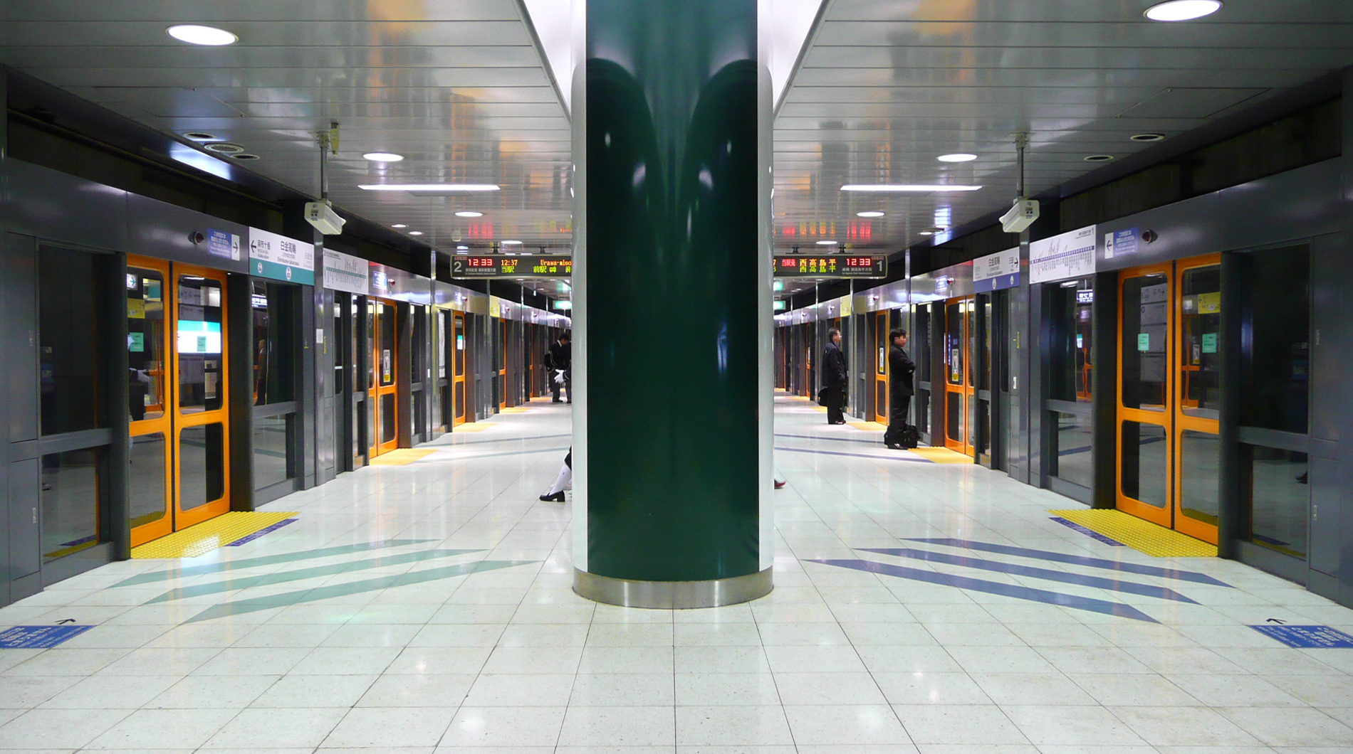 白金高輪駅ホーム（2007年撮影）